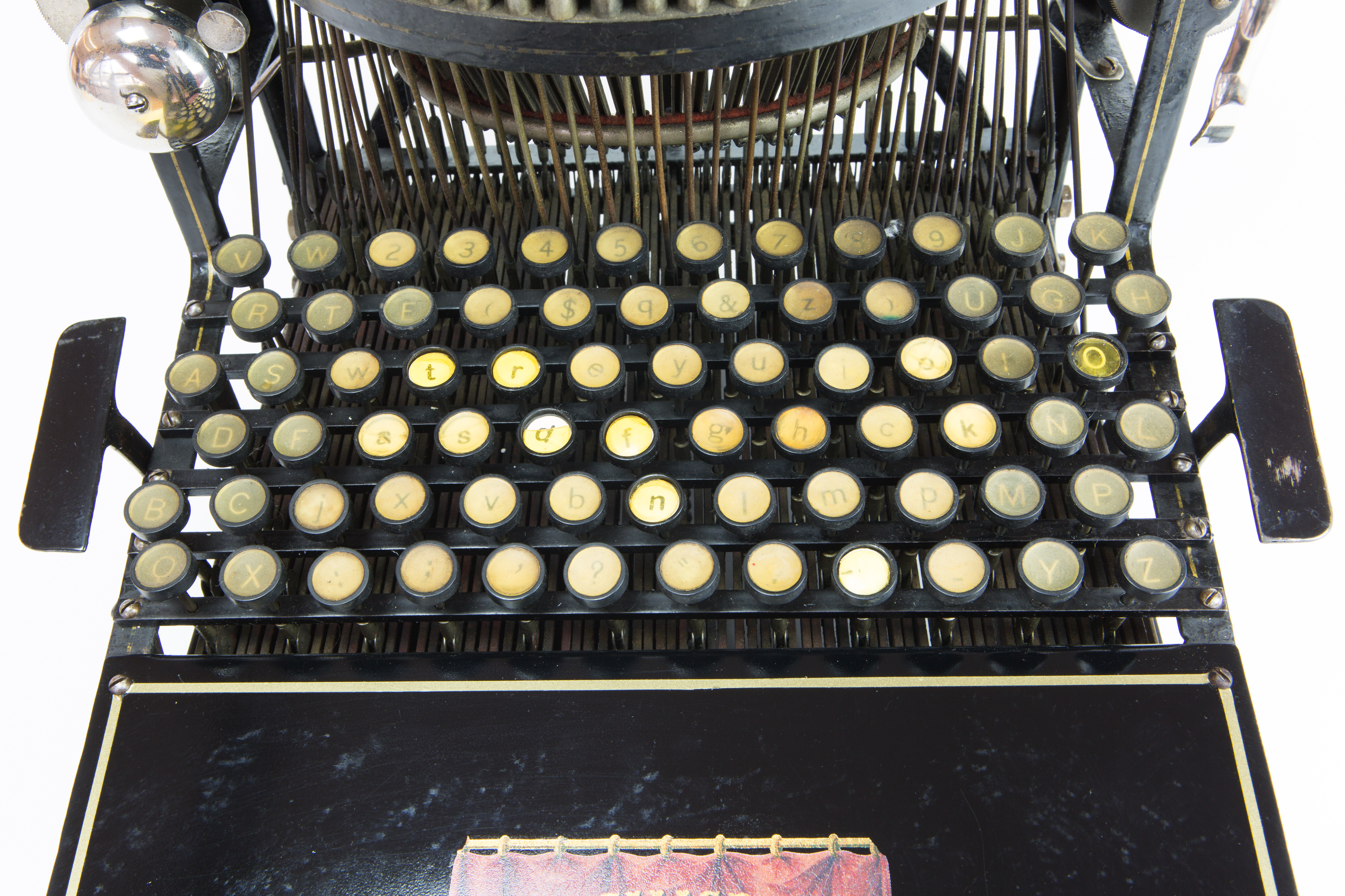 Machine à écrire Caligraph n°2 - fabriquée en 1889 (USA)